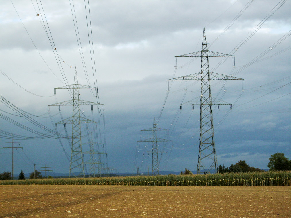 Hybridleitungen östlich von Kornwestheim. Links die Leitung Kornwestheim-Neckarwestheim ( 220 kV-Drehstrom, 110 kV-Bahnstrom, neben der Bahnstromleitung GKN-Neckarwestheim/Bahnstromschaltwerk einzige Bahnstromleitung mit Viererbündel), rechts die zur Zeit im Ausbau befindliche Leitung nach Neckarrems (380 kV-Drehstrom, 110 kV-Bahnstrom). Diese Leitung soll nach Fertigstellung die alte Bahnstromleitung Zazenhausen-Plochingen ersetzen